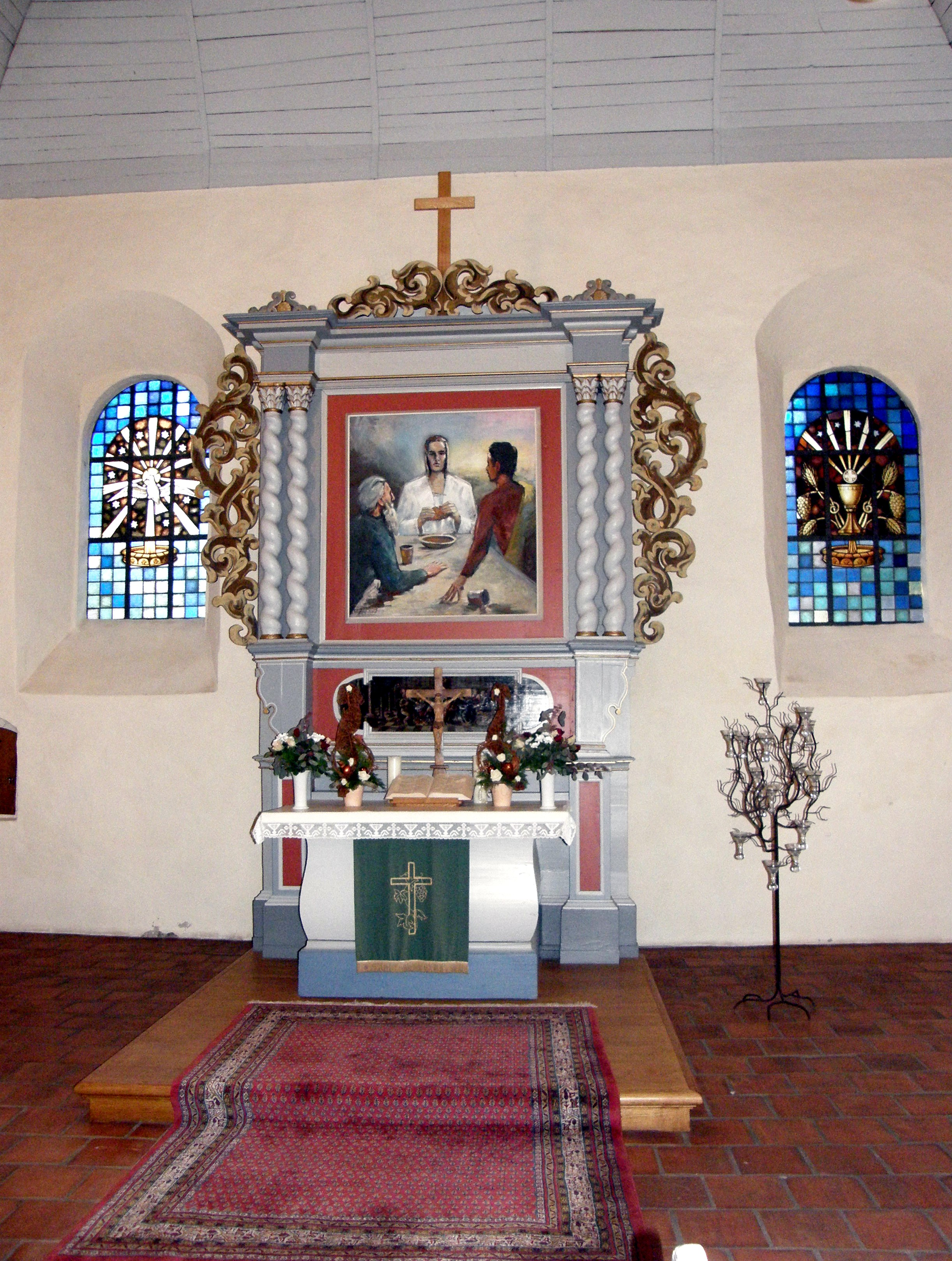 Falkenhagener Dorfkirche, Altar